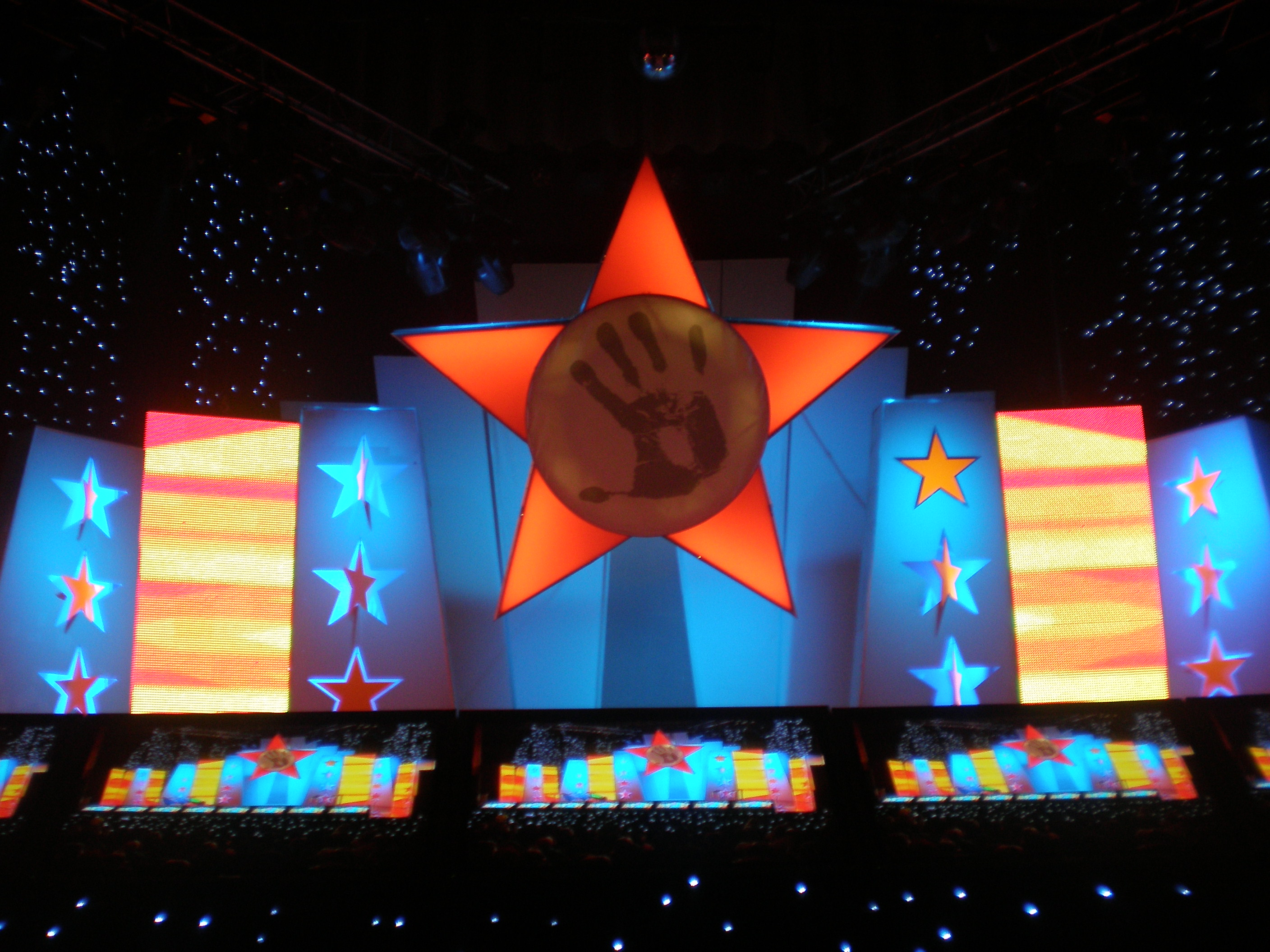 KĮŽ 3 scena, Jonava